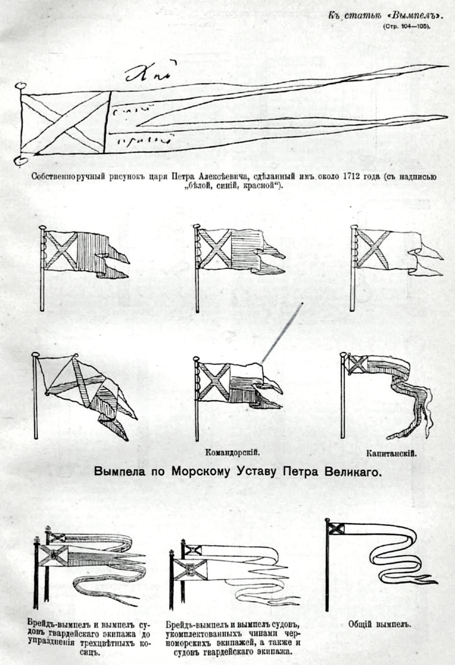 Данная картинка была использована в статье «Вымпел» опубликованной в шестом томе «Военной энциклопедии», который был издан книгоиздательским товариществом Ивана Дмитриевича Сытина в 1912 году в столице Российской империи городе Санкт-Петербурге.